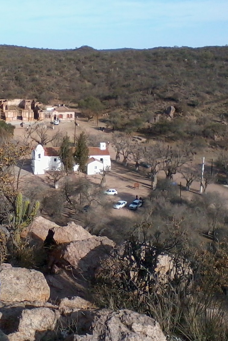 Santuario de Ntra. Sra. de la Consolación en Sumampa